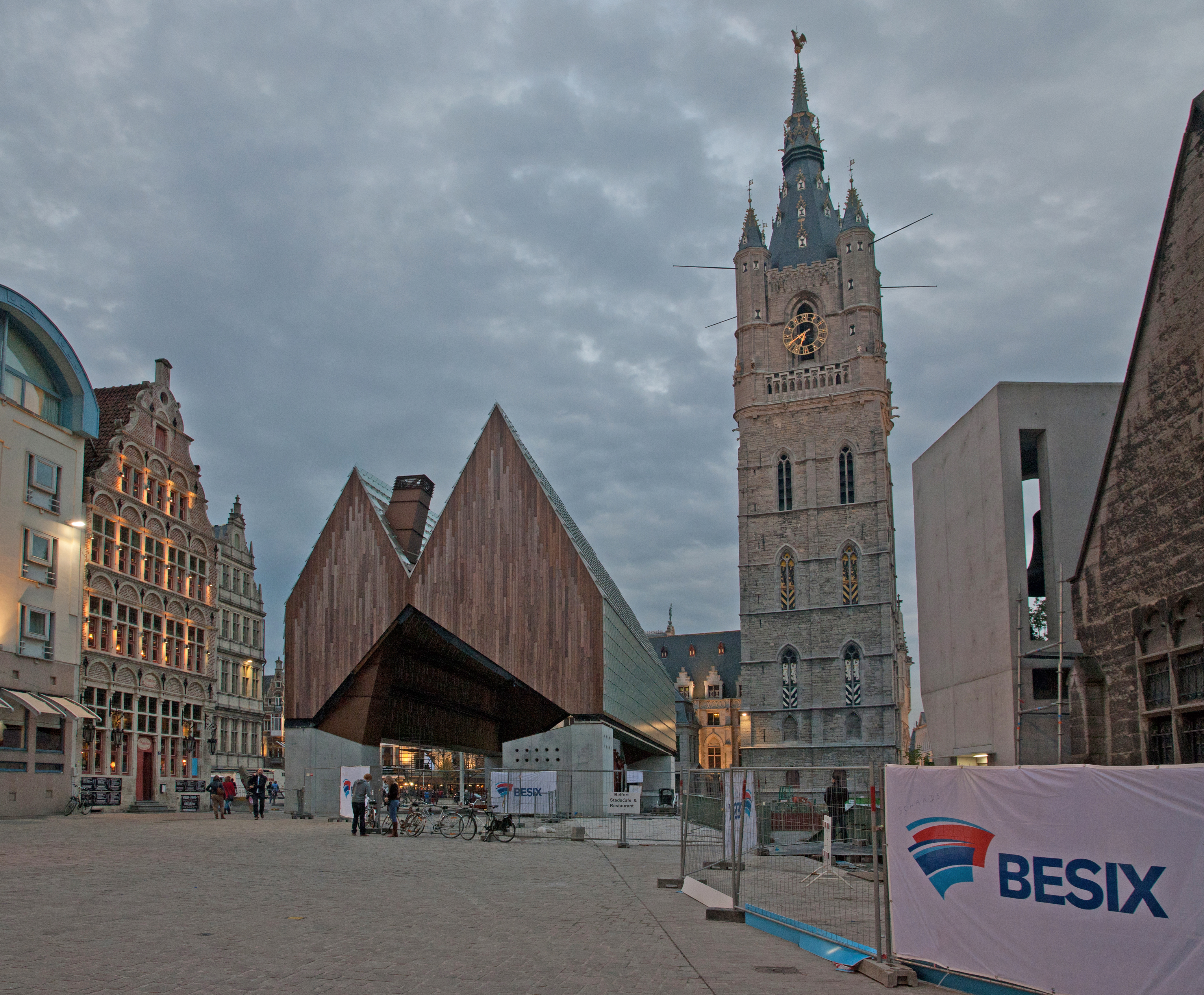 Het belfort van Gent.